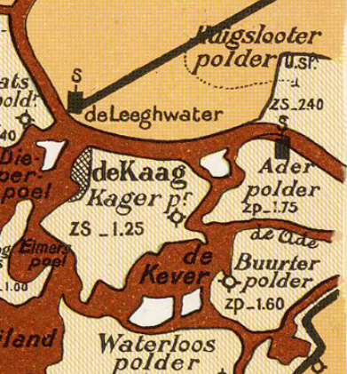 Aderpolder